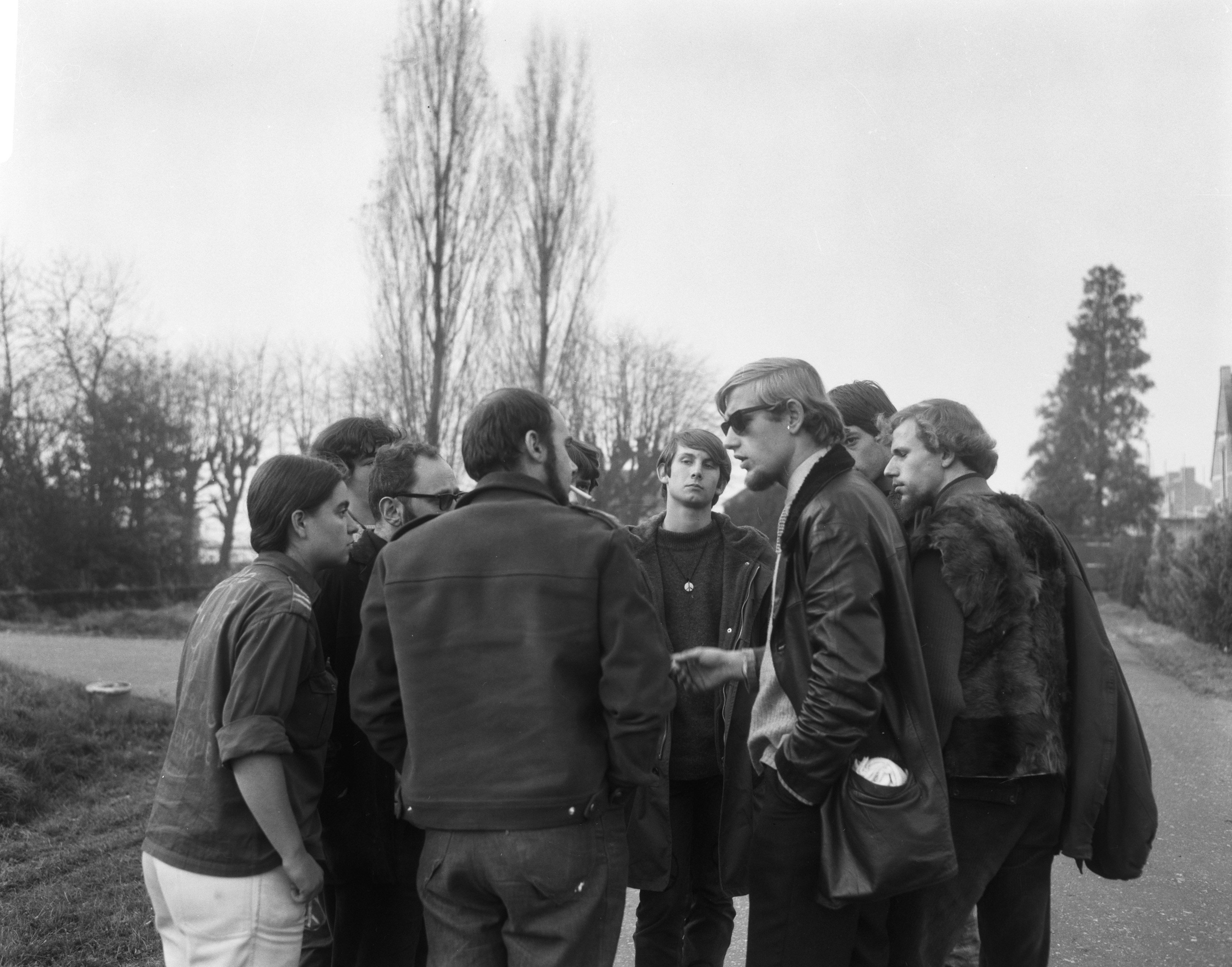 Collectie / Archief : Fotocollectie Anefo Reportage / Serie : Provo's houden internationaal concilie in kasteel Borgharen te Maastricht Datum : 12 november 1966 Locatie : Borgharen, Limburg, Maastricht Trefwoorden : provo's Fotograaf : Bilsen, Joop van / Anefo Auteursrechthebbende : Nationaal Archief Materiaalsoort : Negatief (zwart/wit) Nummer archiefinventaris : bekijk toegang 2.24.01.04 Bestanddeelnummer : 919-7828